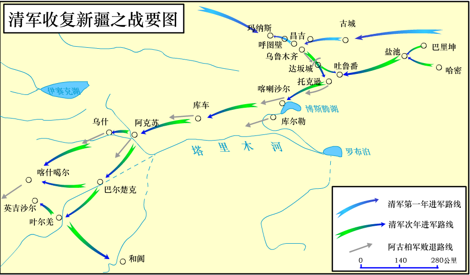 中文（中国大陆）: 清军收复新疆之战示意图